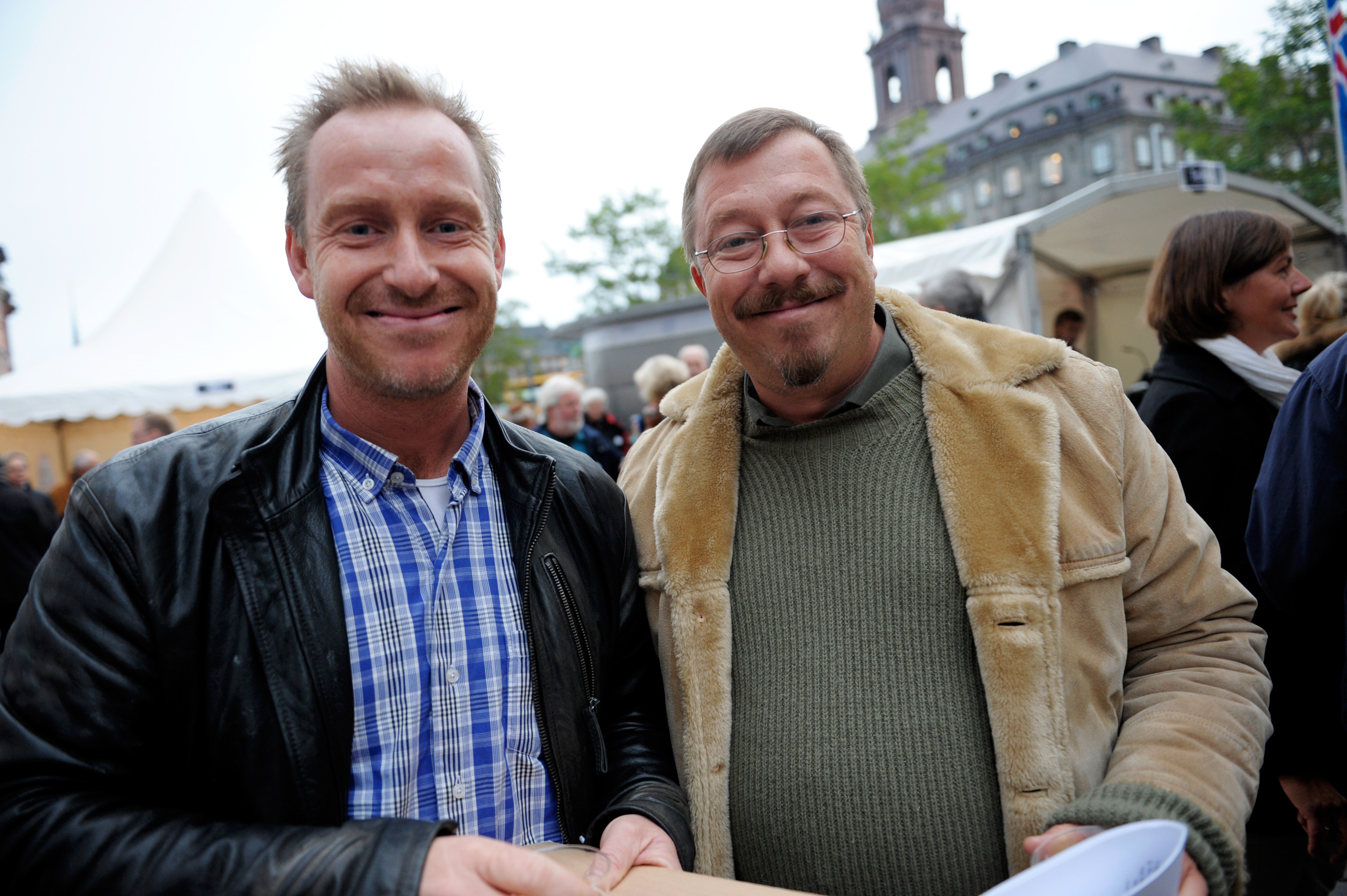 Kulturnatten 2010